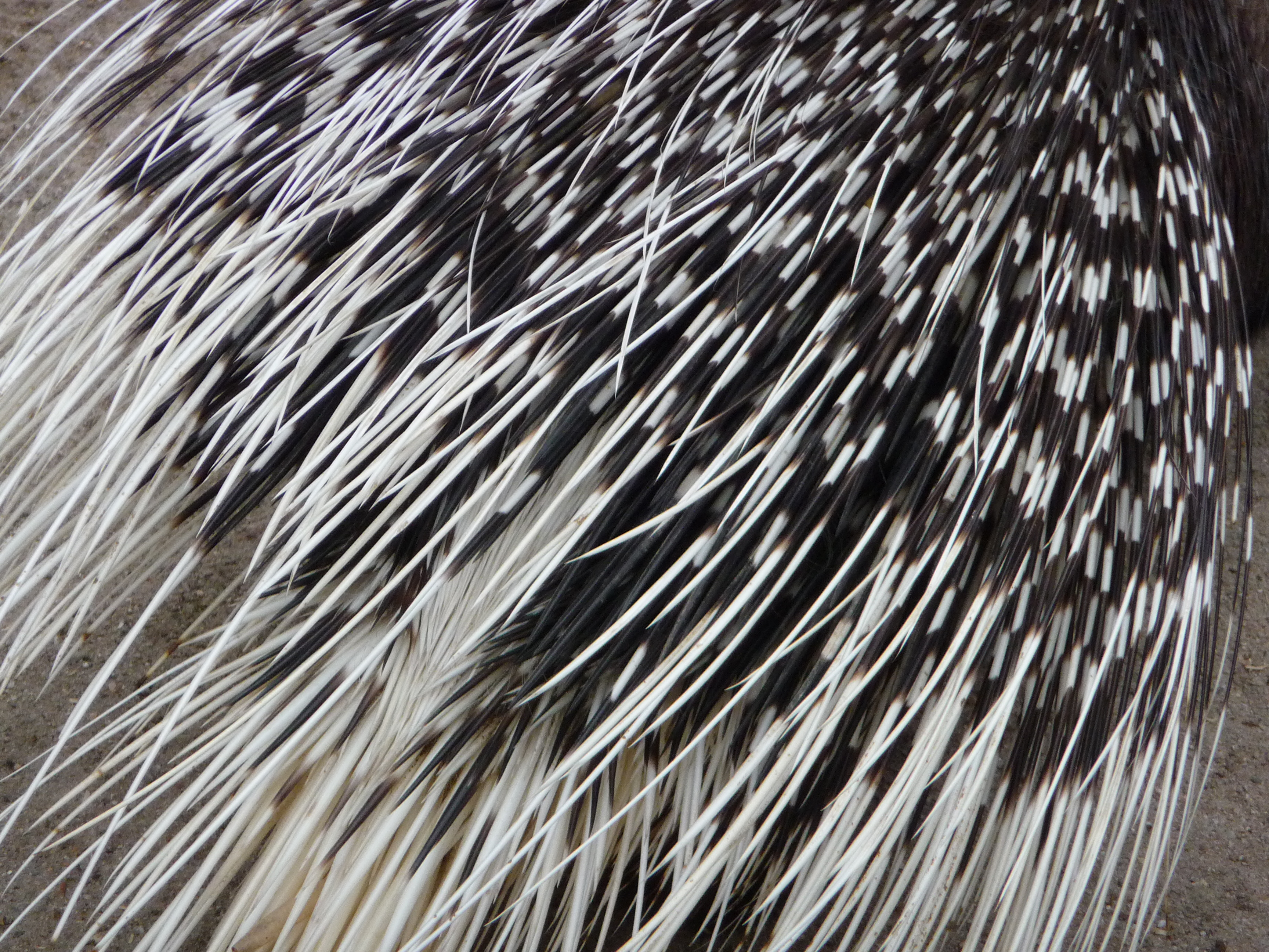 Stacheln des Gewöhnlichen Stachelschweins (Hystrix cristata)